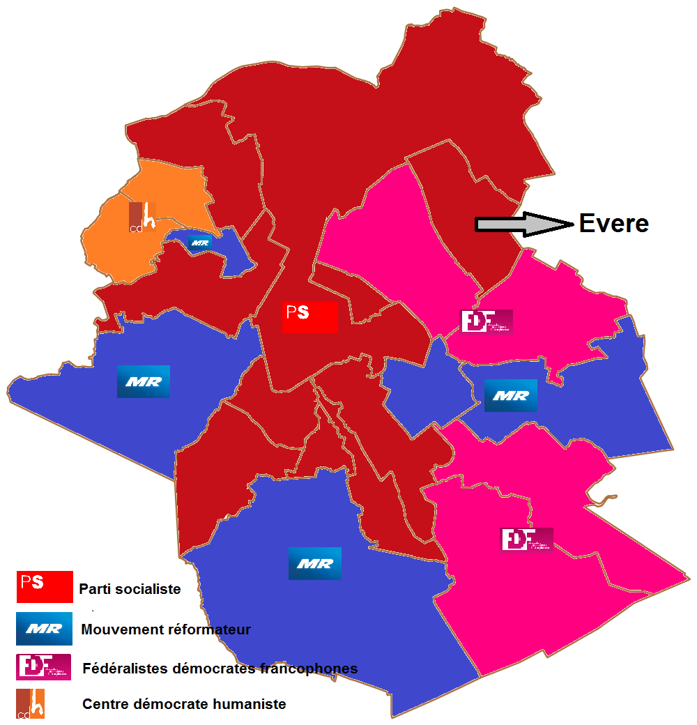 Localisation d'Evere sur la carte d'appartenance politique des bourgmestres de la Région de Bruxelles-Capitale suite à l'élection communale de 2006